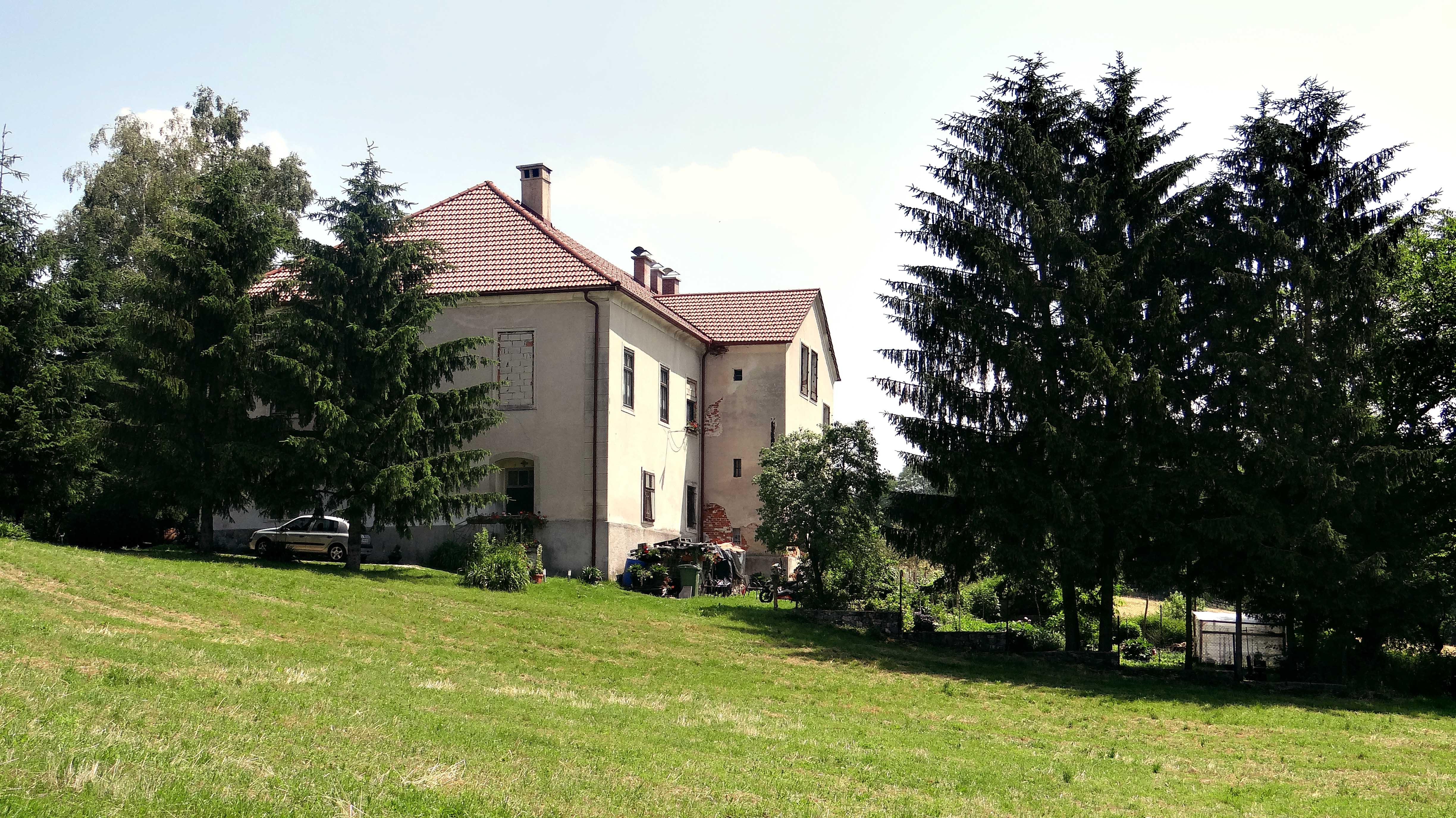 Dvorec Blagovna 2013